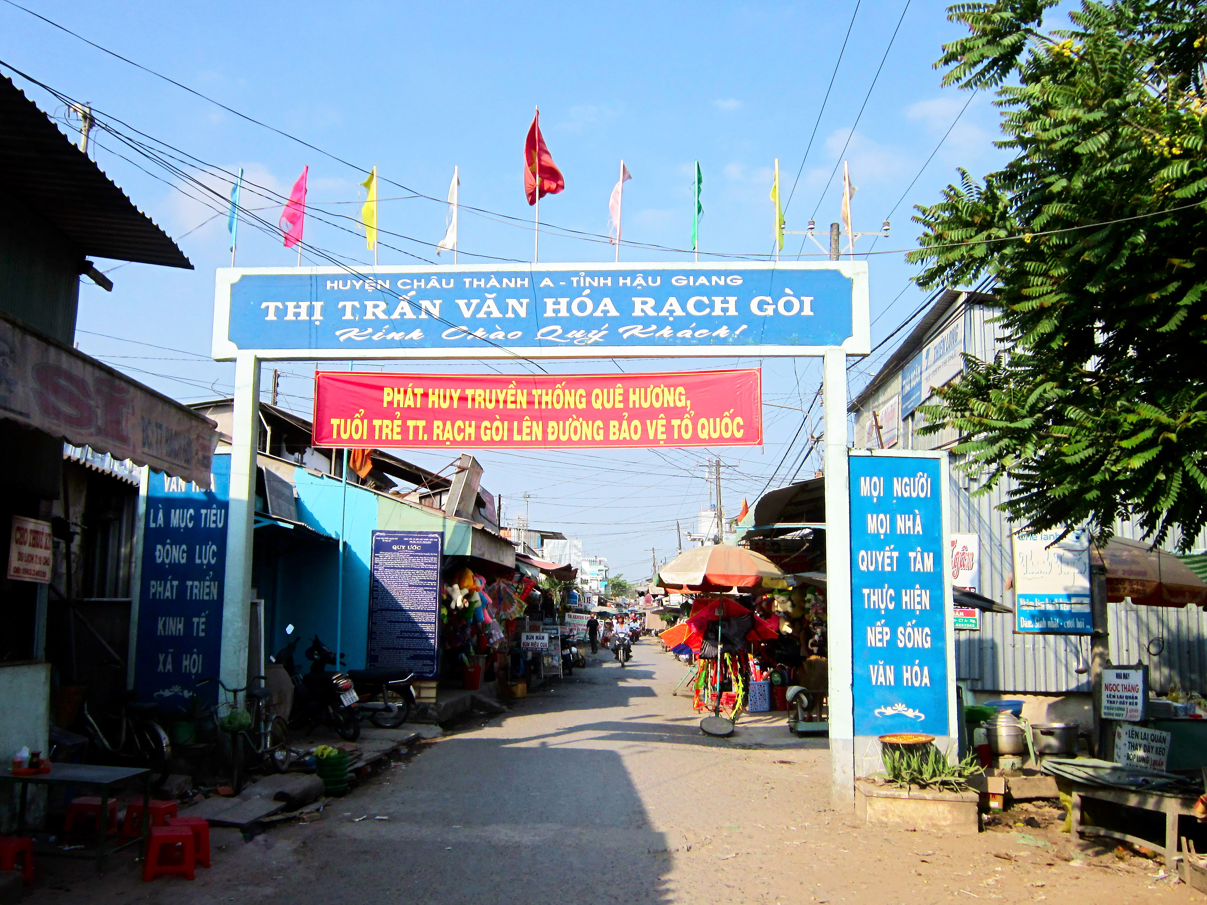 Đường vào khu chợ thị trấn Rạch Gòi, thuộc huyện Châu Thành A, tỉnh Hậu Giang, Việt Nam.